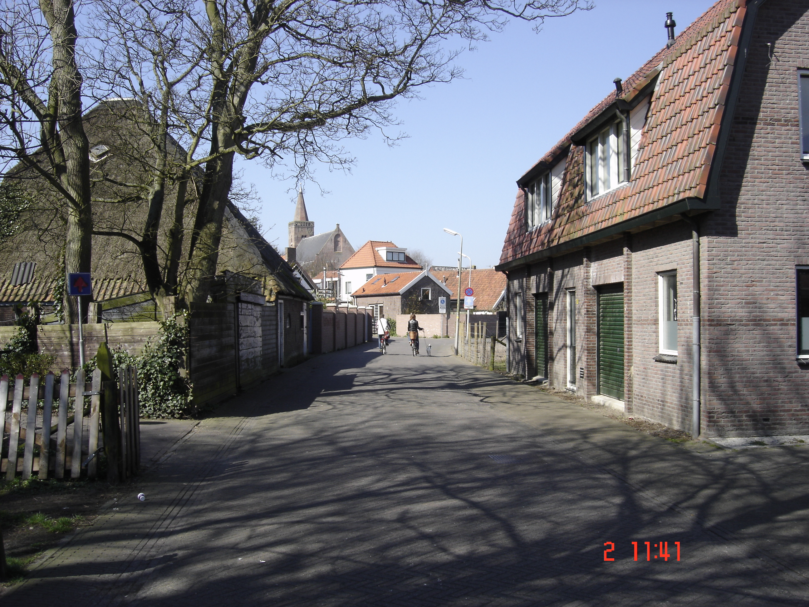 Doorkijkje Den Burgh Texel (jwt april 2005)